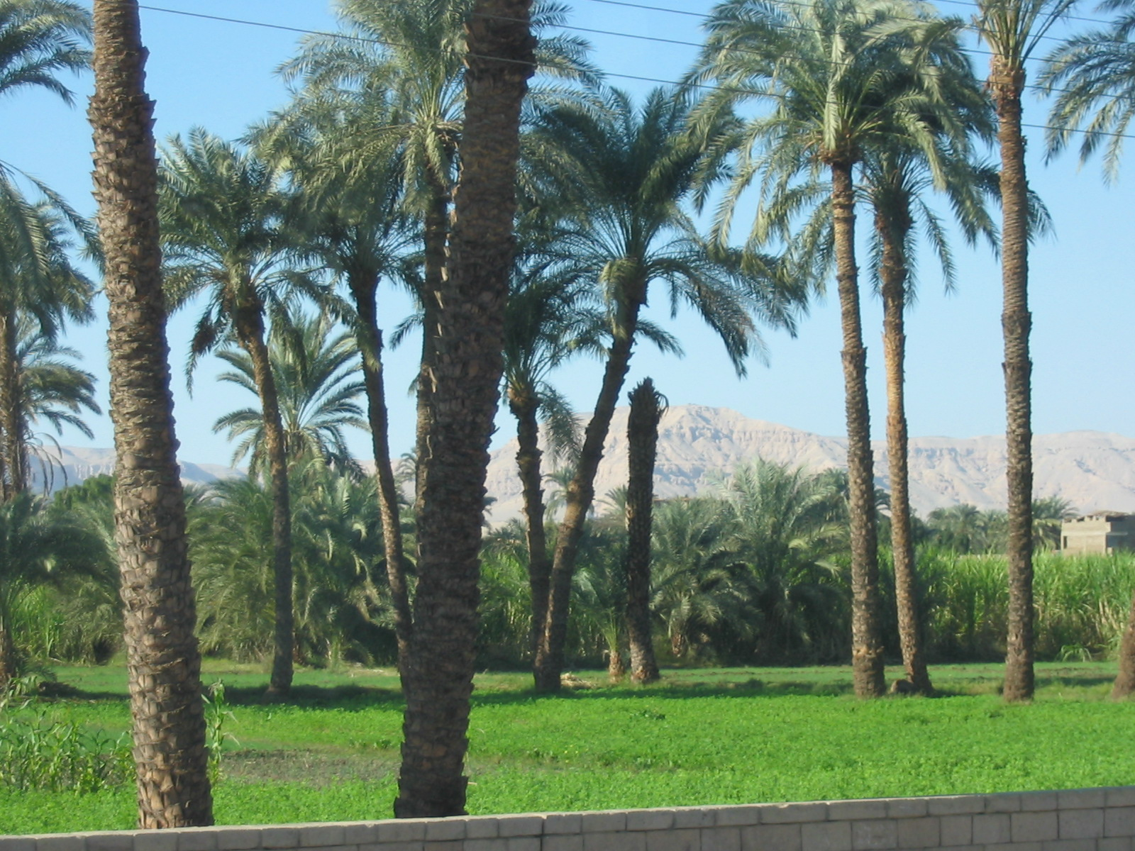 double licence